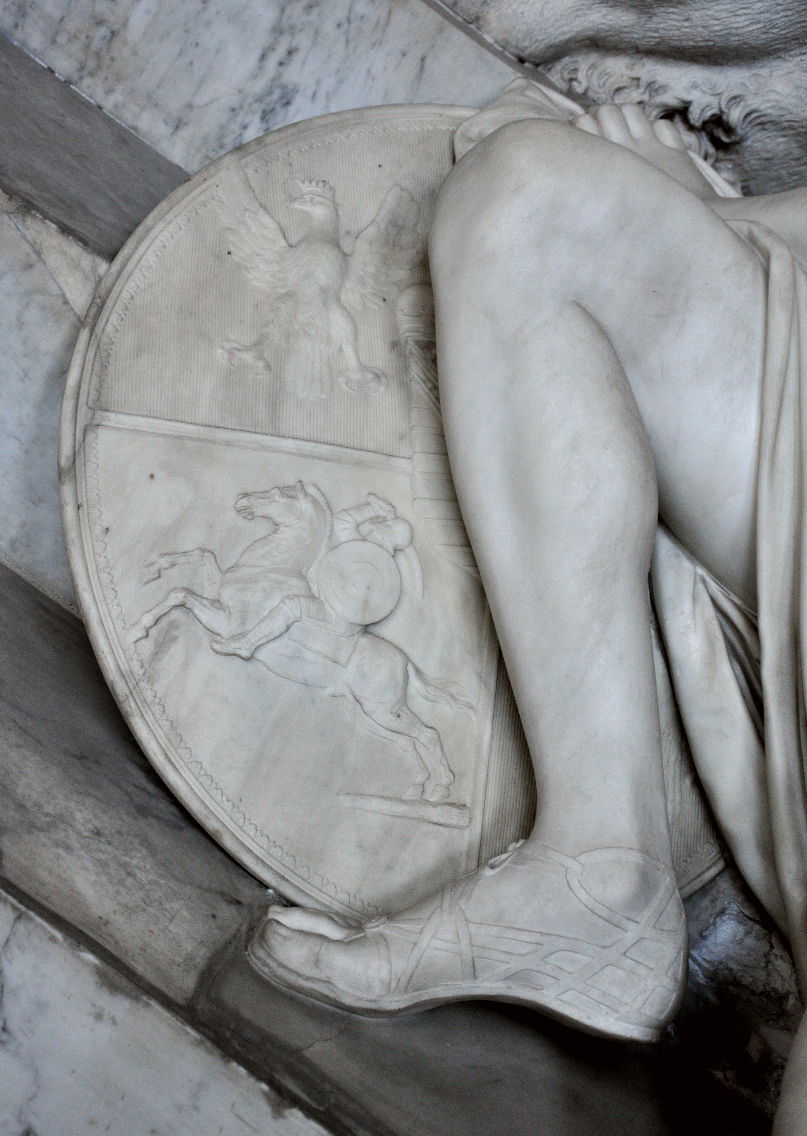 Wien, Augustinerkirche, Grabdenkmal für Erzherzogin Marie Christine von Antonio Canova, 1805 Schild des trauernden Engels mit Wappenrelief